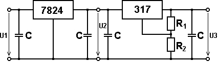 Beispiel für die Anwendung von Spannungsreglern.